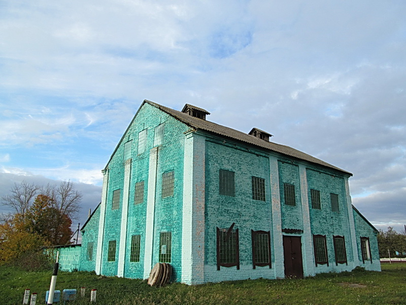 Буховічы. Гаспадарчая пабудова